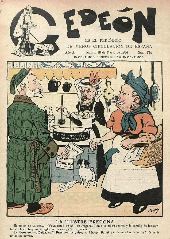 La ilustre fregona, en la revista satírica española Gedeón.